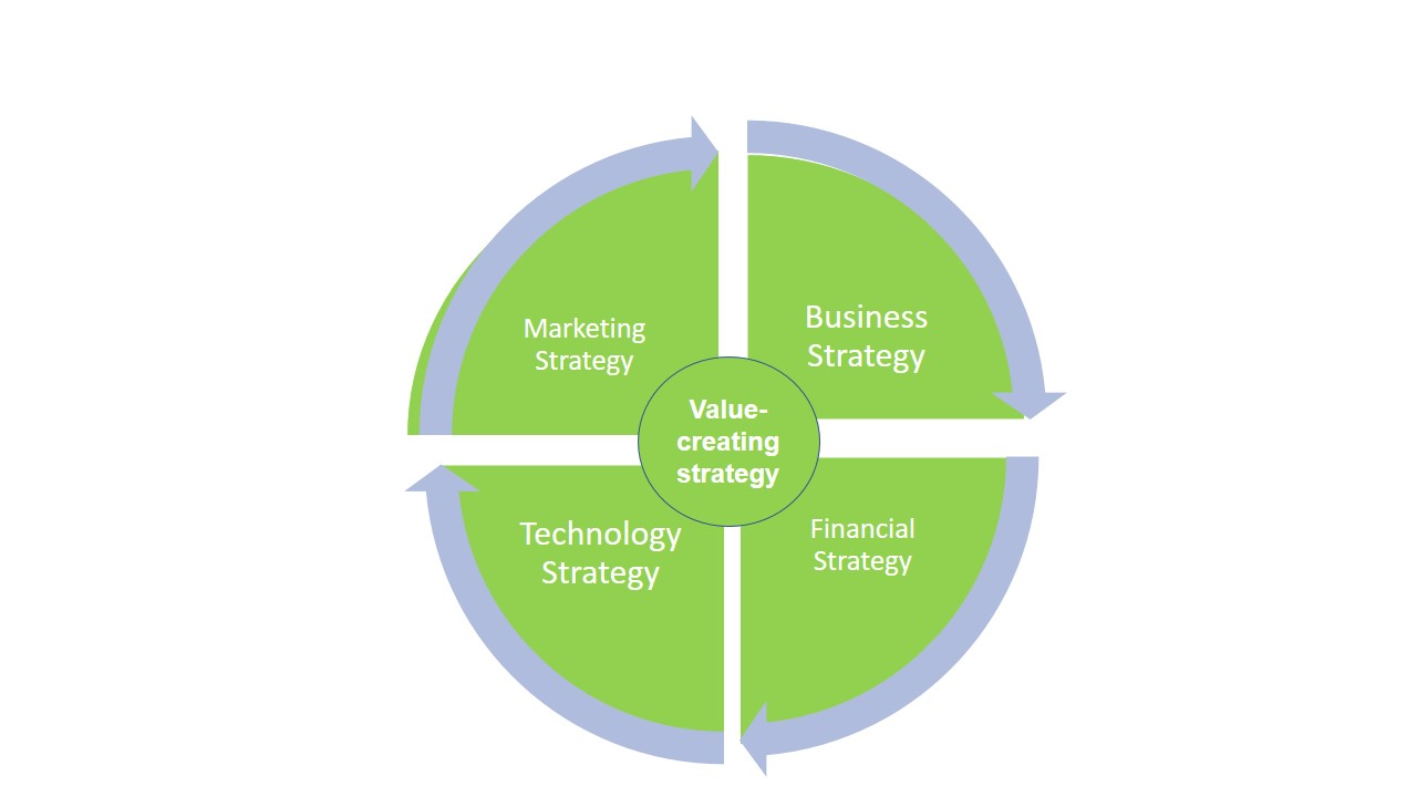 Representation of what value-creating strategy has to involve when being applied.